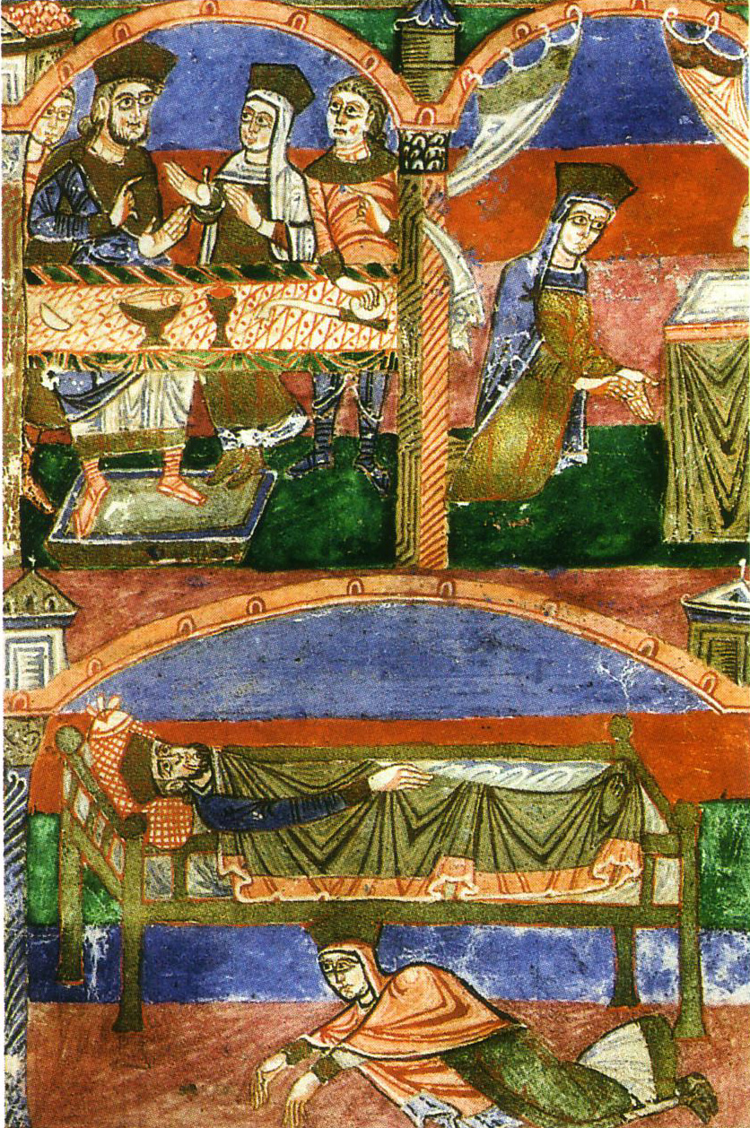 Les noces de Radegonde, Radegonde en prière, Radegonde en prière, prosternée à côté du lit conjugal. Scènes de la vie de sainte Radegonde. Vie de sainte Radegonde, XIème siècle, bibliothèque municipale de Poitiers.